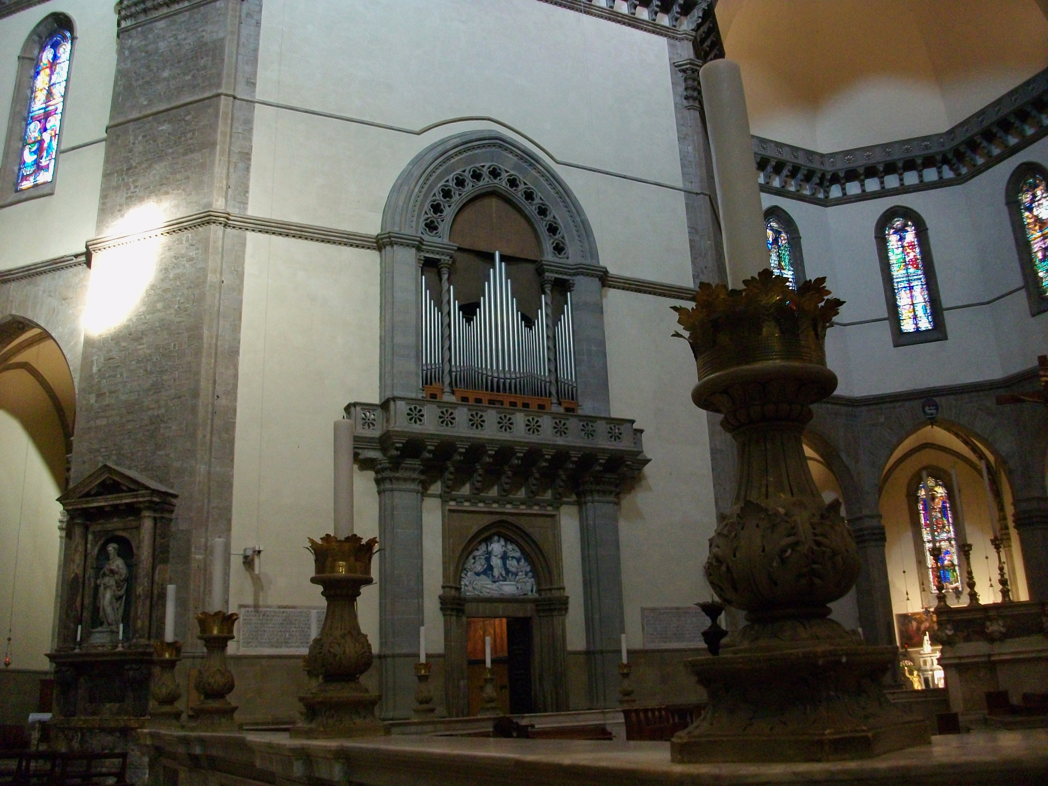 Interior de santa Maria del Fiore - Florència.